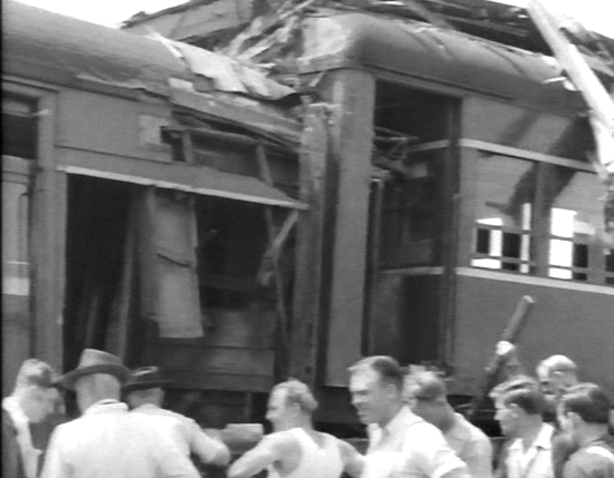 Sydenham Rail Disaster 1953